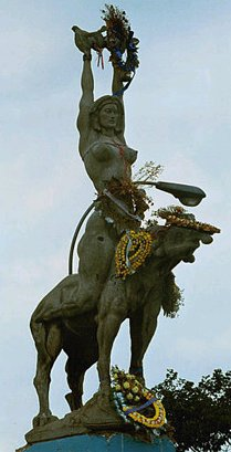 Estatua de Maria Lionza en la autopista Francisco Fajardo